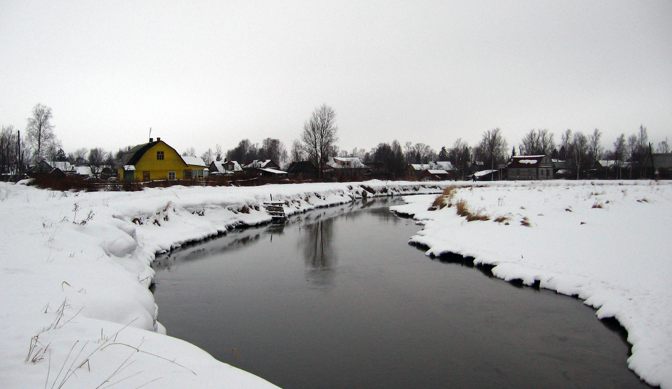 Izhora River (Inger River) near selo Myza-Ivanovka (Мыза-Ивановка)